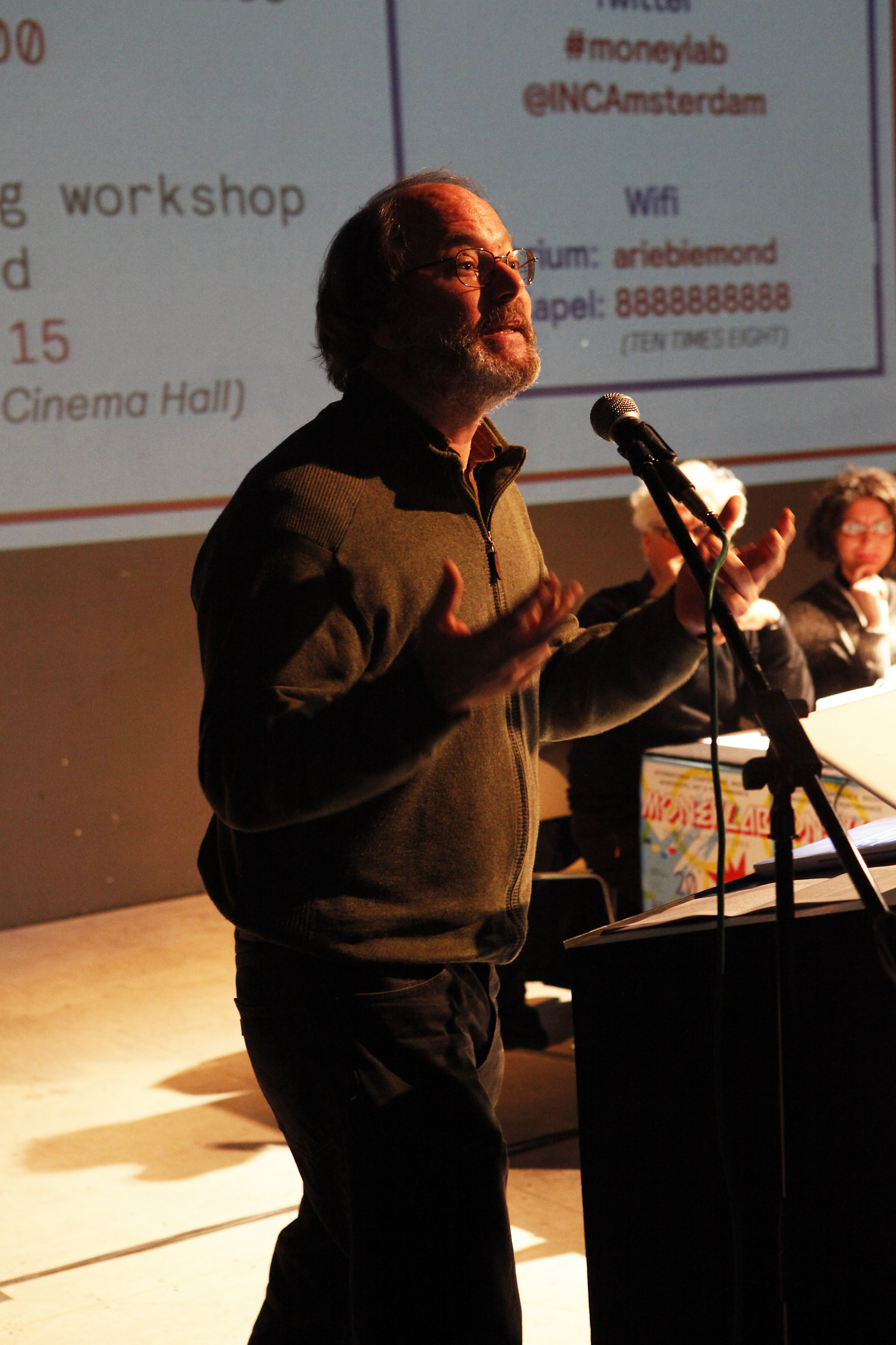 Brian Holmes